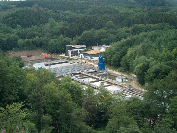 Gruppenklärwerk Radevormwald in Radevormwald-Neuland